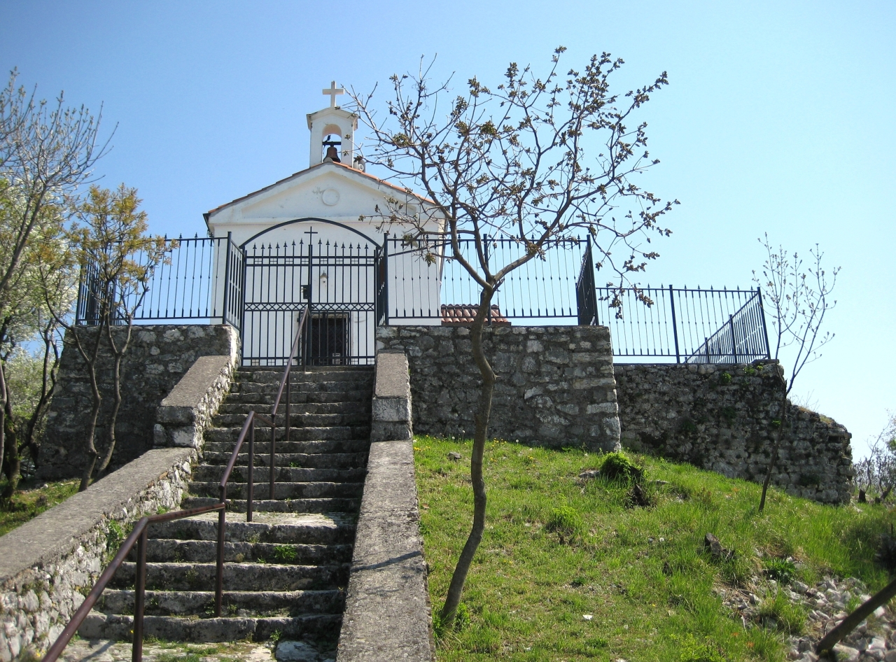 Kapelica Sv. Križ u Rijeci. Nalazi se na mjestu nekadašnjeg glavnog obrambenog bedema gradine. U ispravi od 1670. godine spominje se kapela svetog Križa riječima: "Sveti Križ nad Vezichu".